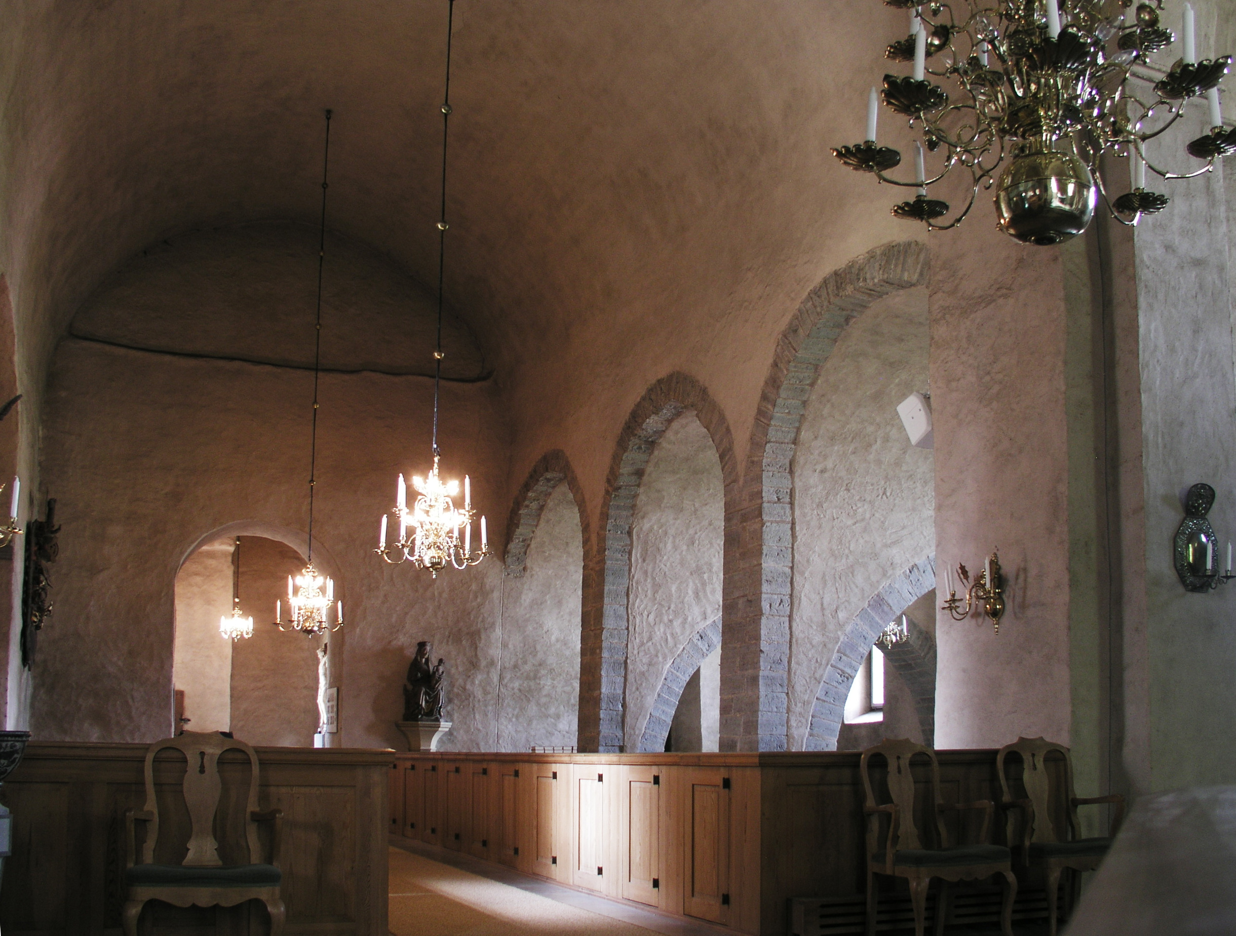 Heda kyrka, Diocese of Linköping, Ödeshögs kommun. Nave.